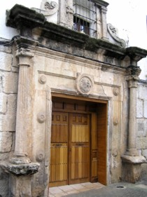 Antiguo juzgado de Beas